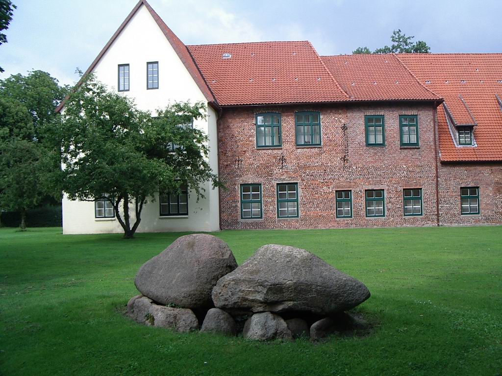 Das Alte Kreishaus (Rückseite) in Bremervörde, Niedersachsen, heute Bachmann-Museum Selbst fotografiert von Benutzer:Geoz August 2006